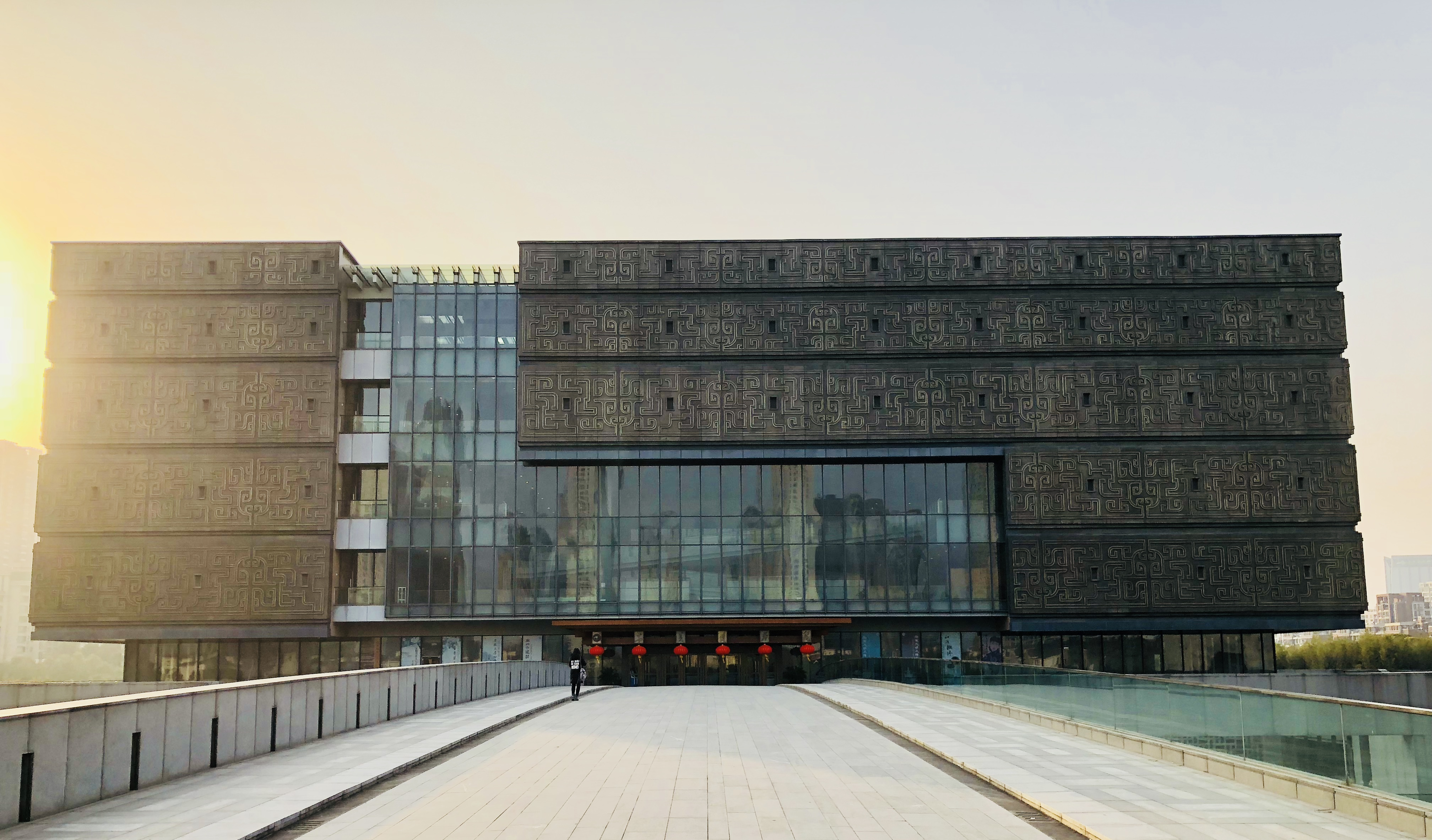 中文（中国大陆）: 安徽博物院正面